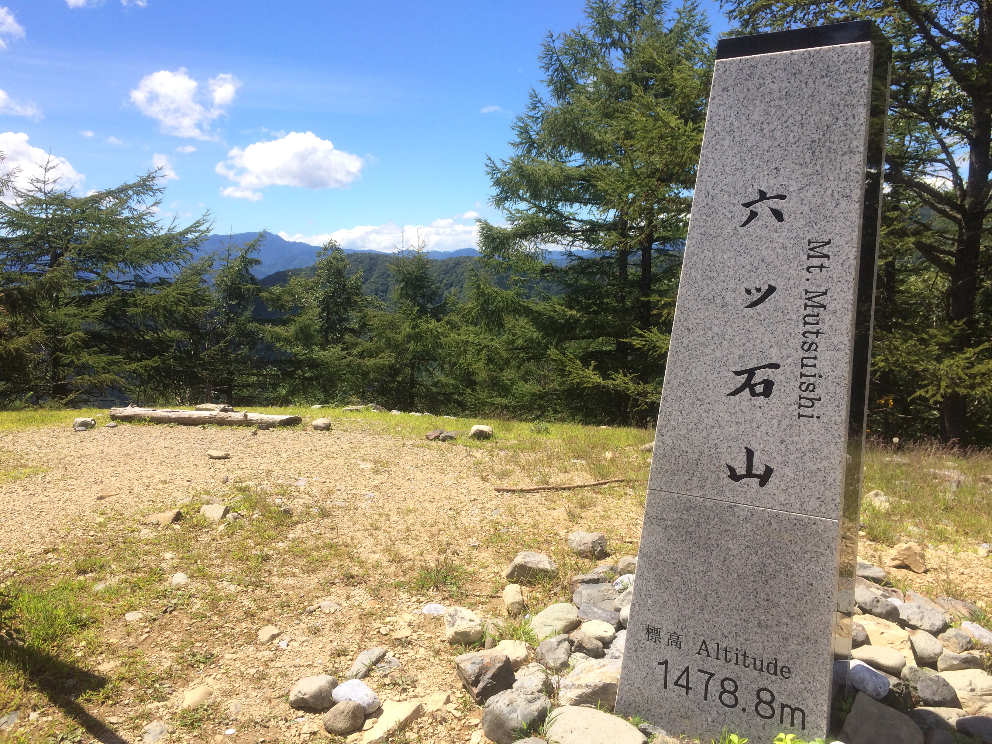 六ツ石山山頂と新しくなった山頂標識